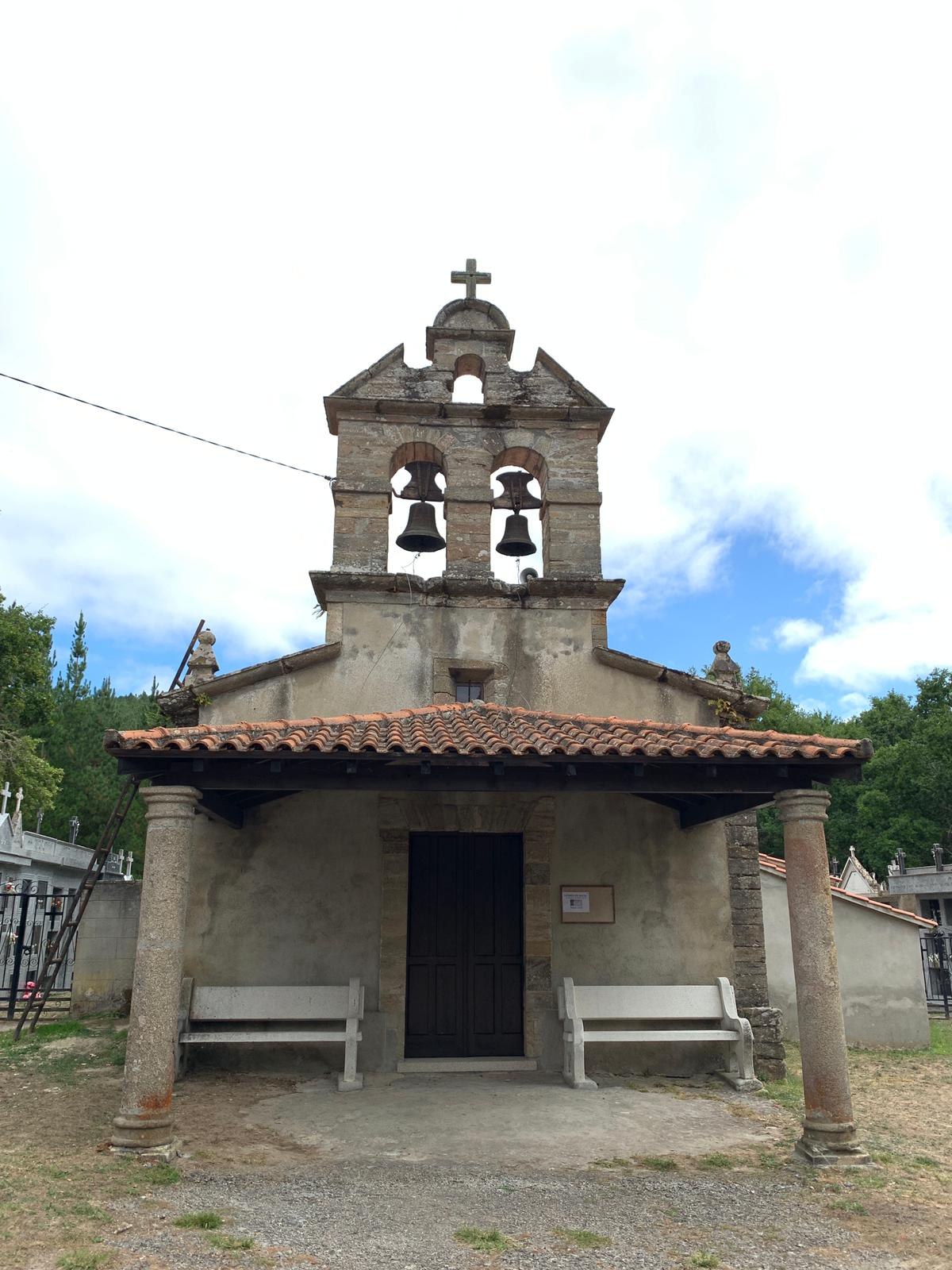 Igrexa de Santa Mariña do Monte (Monforte de Lemos)